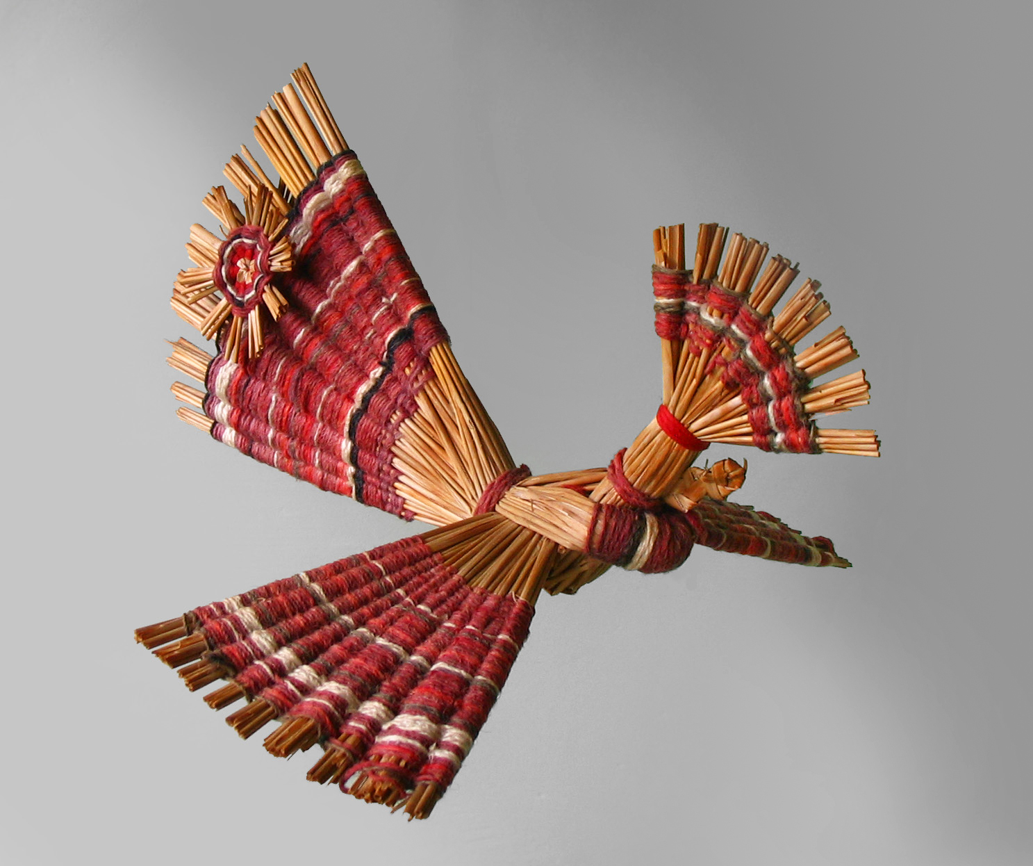 Belarusian Straw Bird